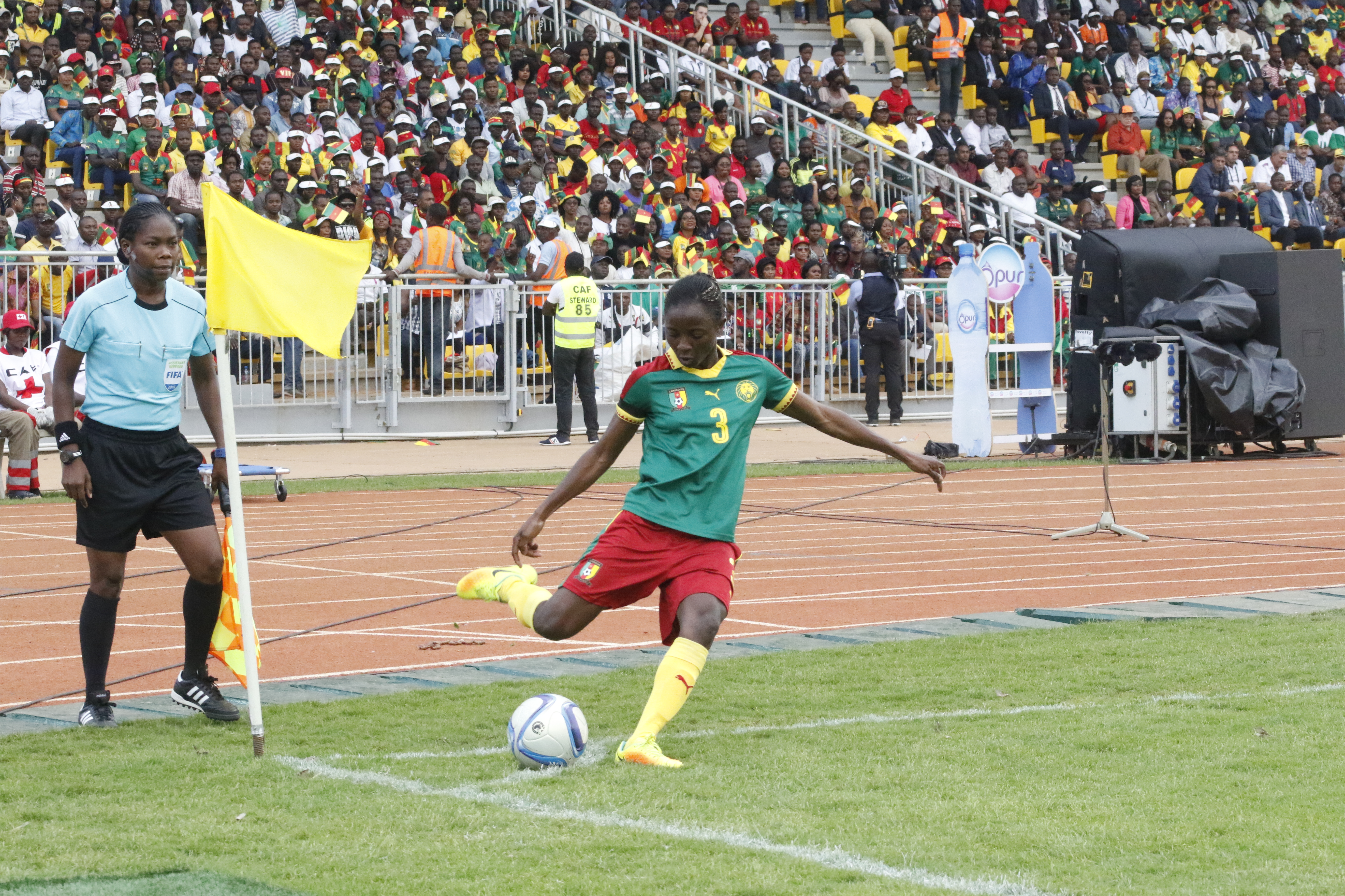 L'attaquante camerounaise pendant la finale de la Coupe d'Afrique des Nations contre l'équipe du Nigéria